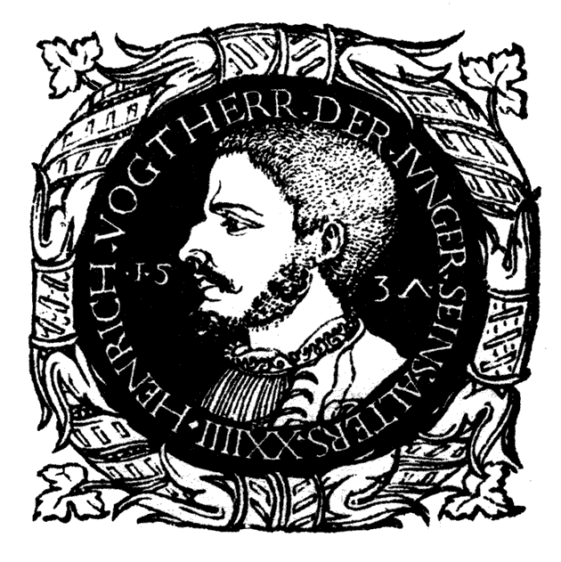 Heinrich Vogtherr der Jüngere im Alter von 24 Jahren, Selbstporträt, Holzschnitt 1537, abgedruckt neben dem Selbstporträt seines Vaters (Heinrich Vogtherr der Ältere) auf dem Titelblatt ihres »Kunstbüchleins«